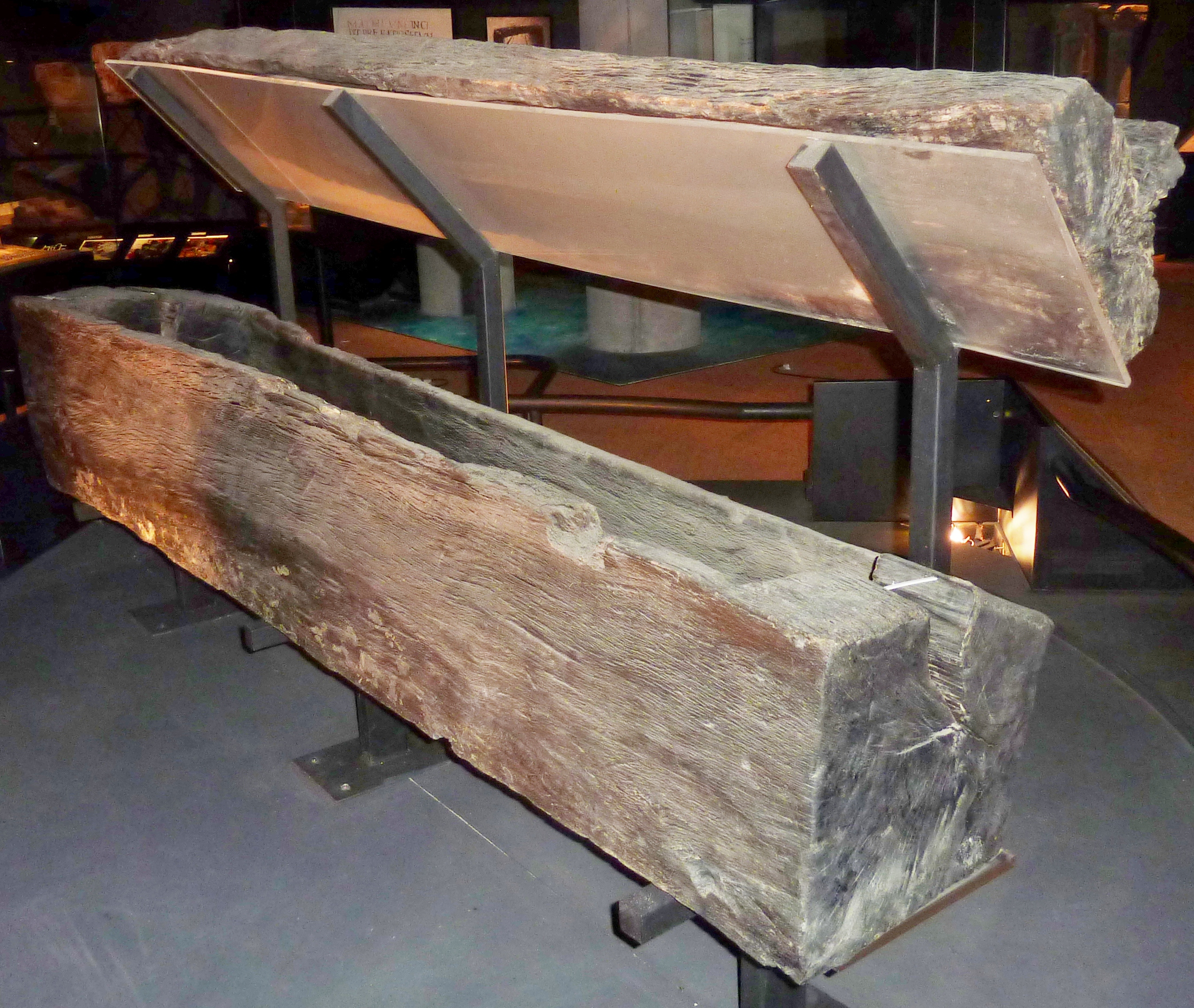 Abbaye de Landévennec : sarcophage en bois trouvé sous le porche de l'ancienne église abbatiale et exhumé en 1985 lors de fouilles (Musée de l'ancienne abbaye de Landévennec). Il a subi un traitement par imprégnation de résine et lyophilisation au Centre d'Etude et de traitement des bois gorgés d'eau de Grenoble pendant 5 ans.